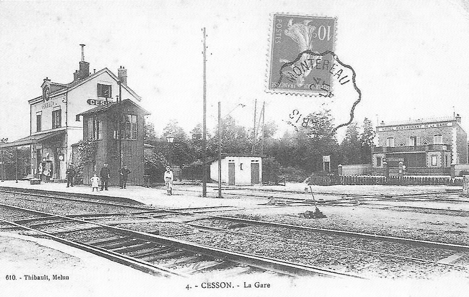 La gare de Cesson (Seine-et-Marne, France), au début du XX° siècle.